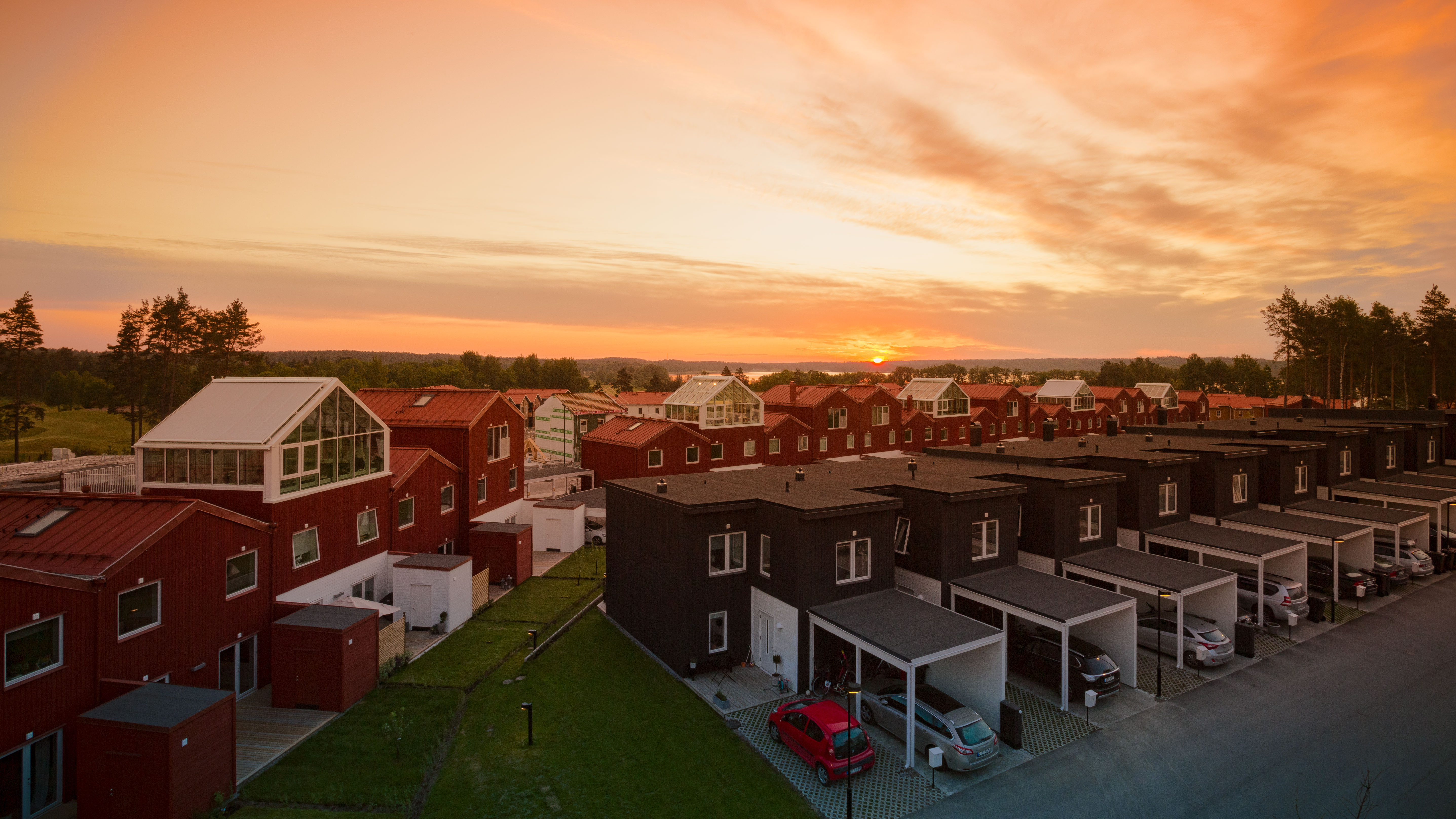 Townhouse Ullna allé i Skogskvarteren, Arninge-Ullna i Täby kommun. De 109 bostäderna i form av radhus och flerbostadshus uppfördes av Titania 2014–2016.